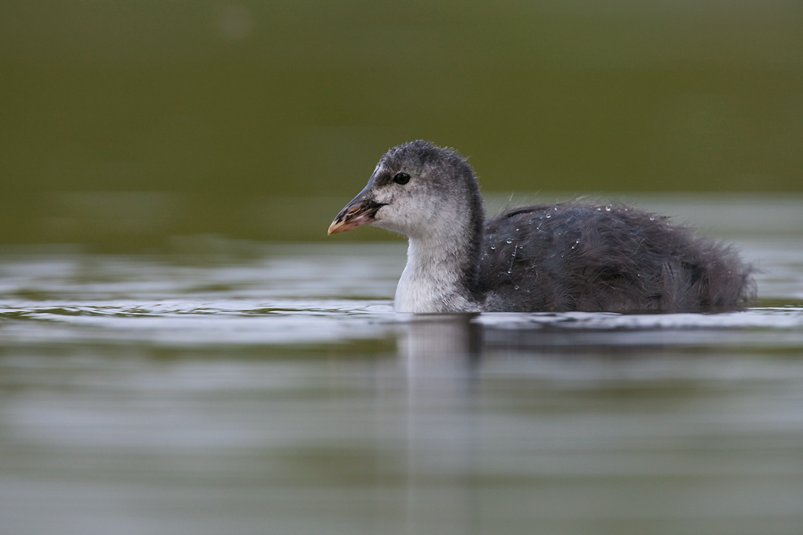 Fulica atra, young